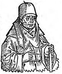 Jean Cassien (360-435) dans le Liber Chronicarum de Schedel, Hartmann (1440-1514), p. 246.